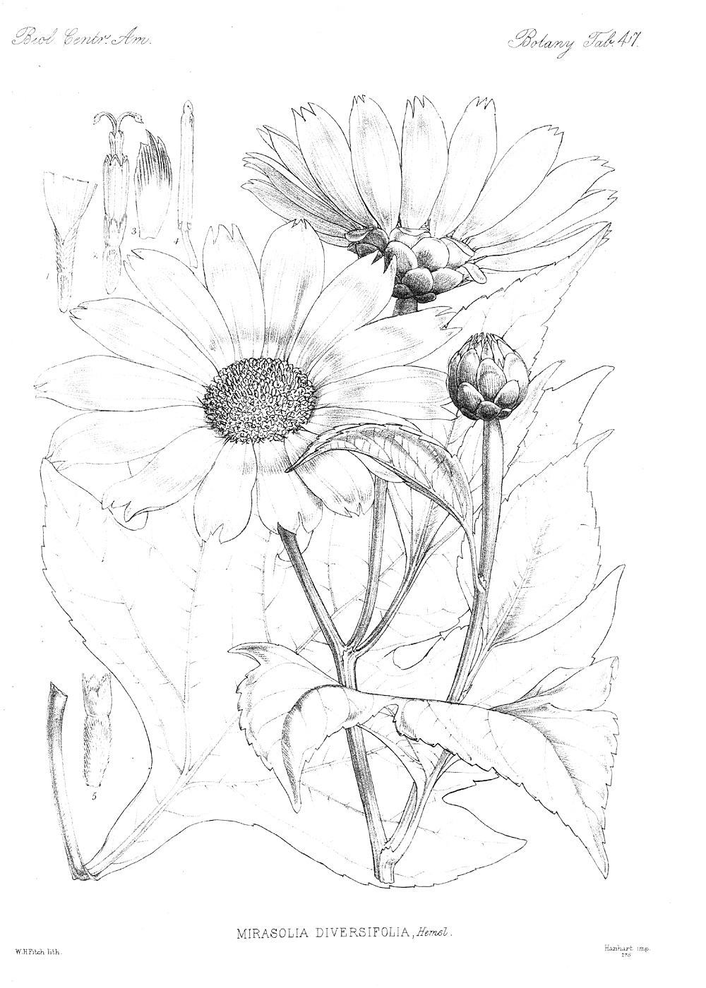 Tithonia diversifolia (Original name Mirasolia diversifolia Hemsl.)